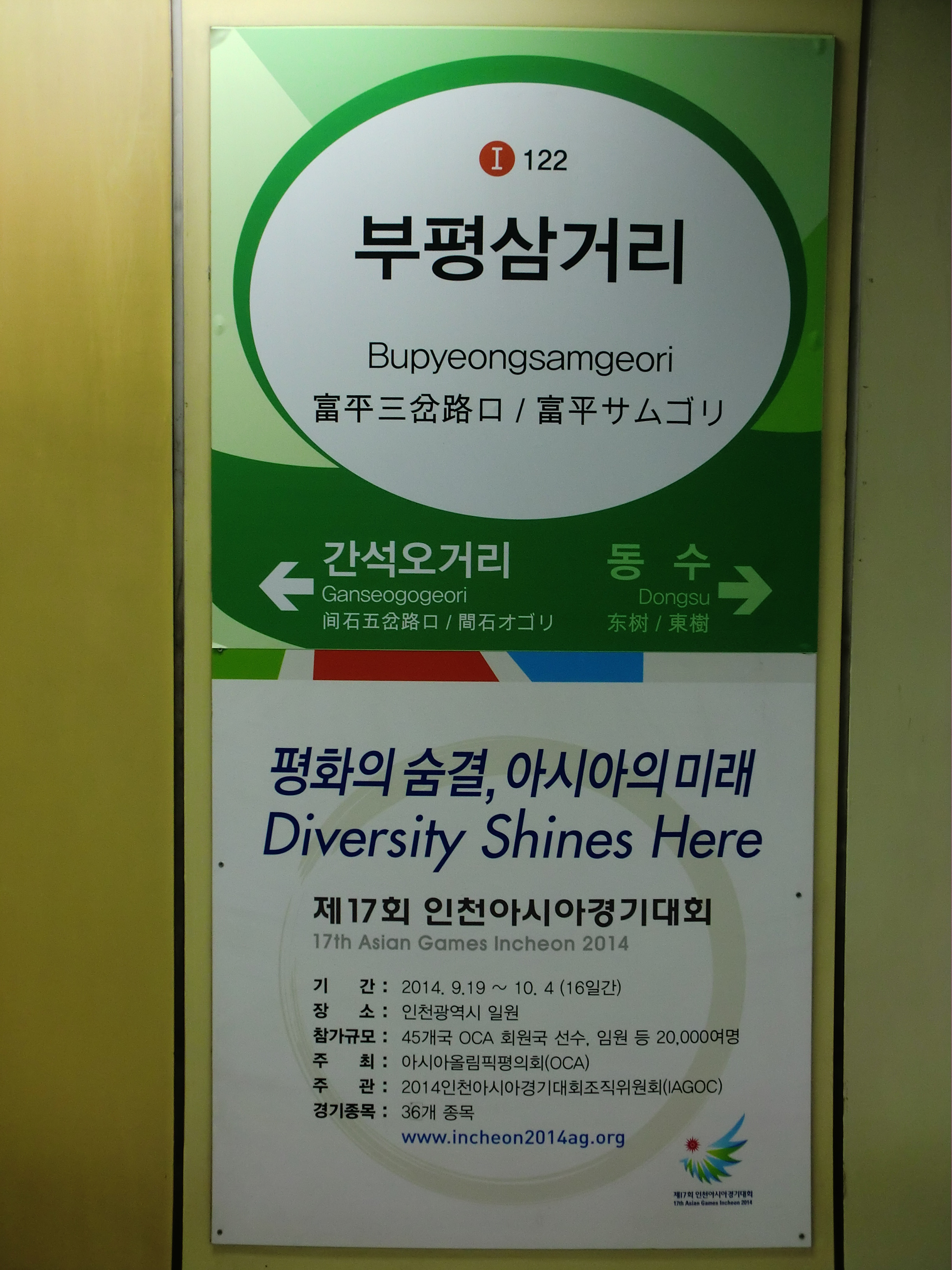 인천메트로 1호선 부평삼거리역 역명판